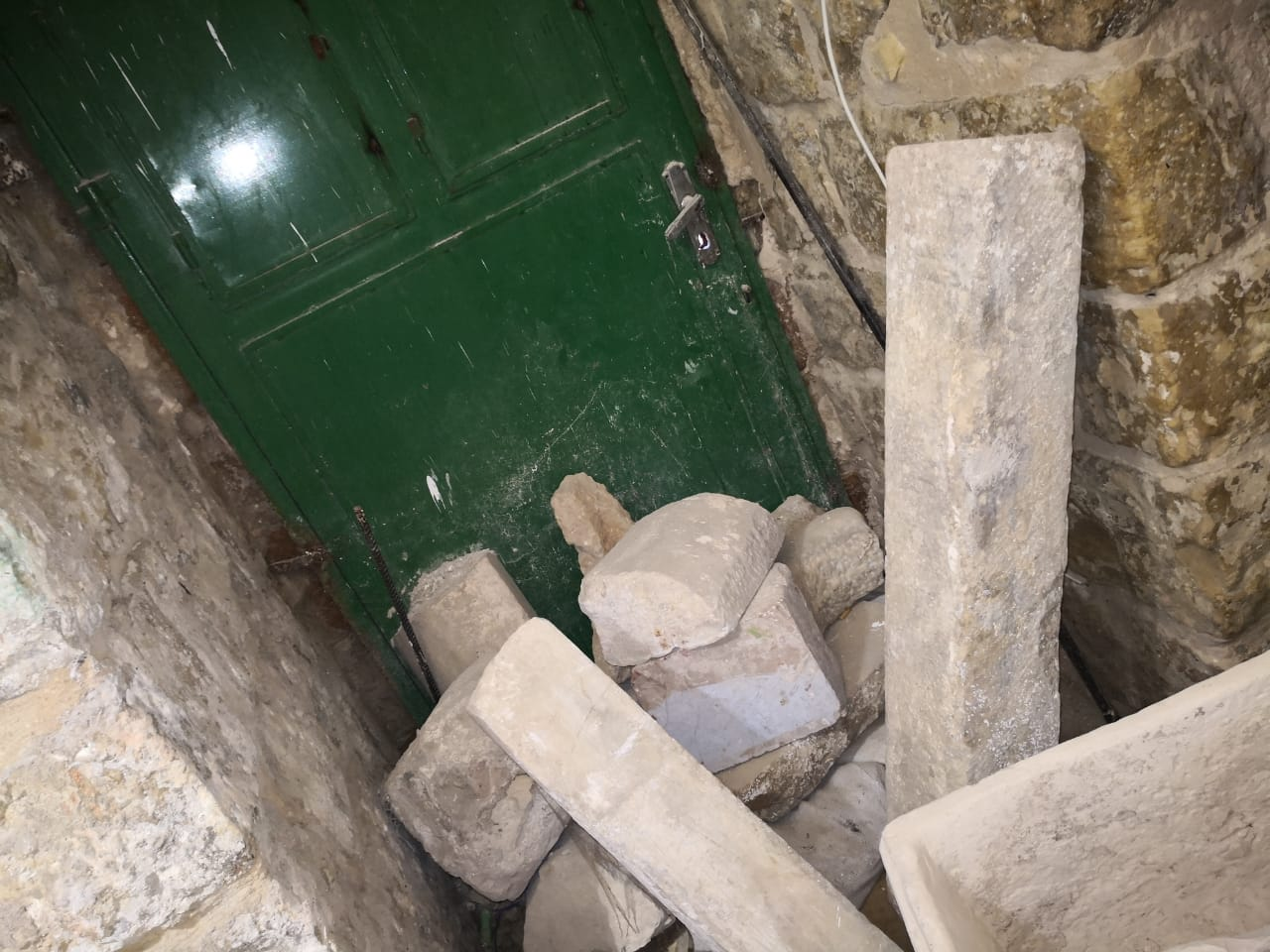 بعض الخرابات في البلدة القديمة في الخليل